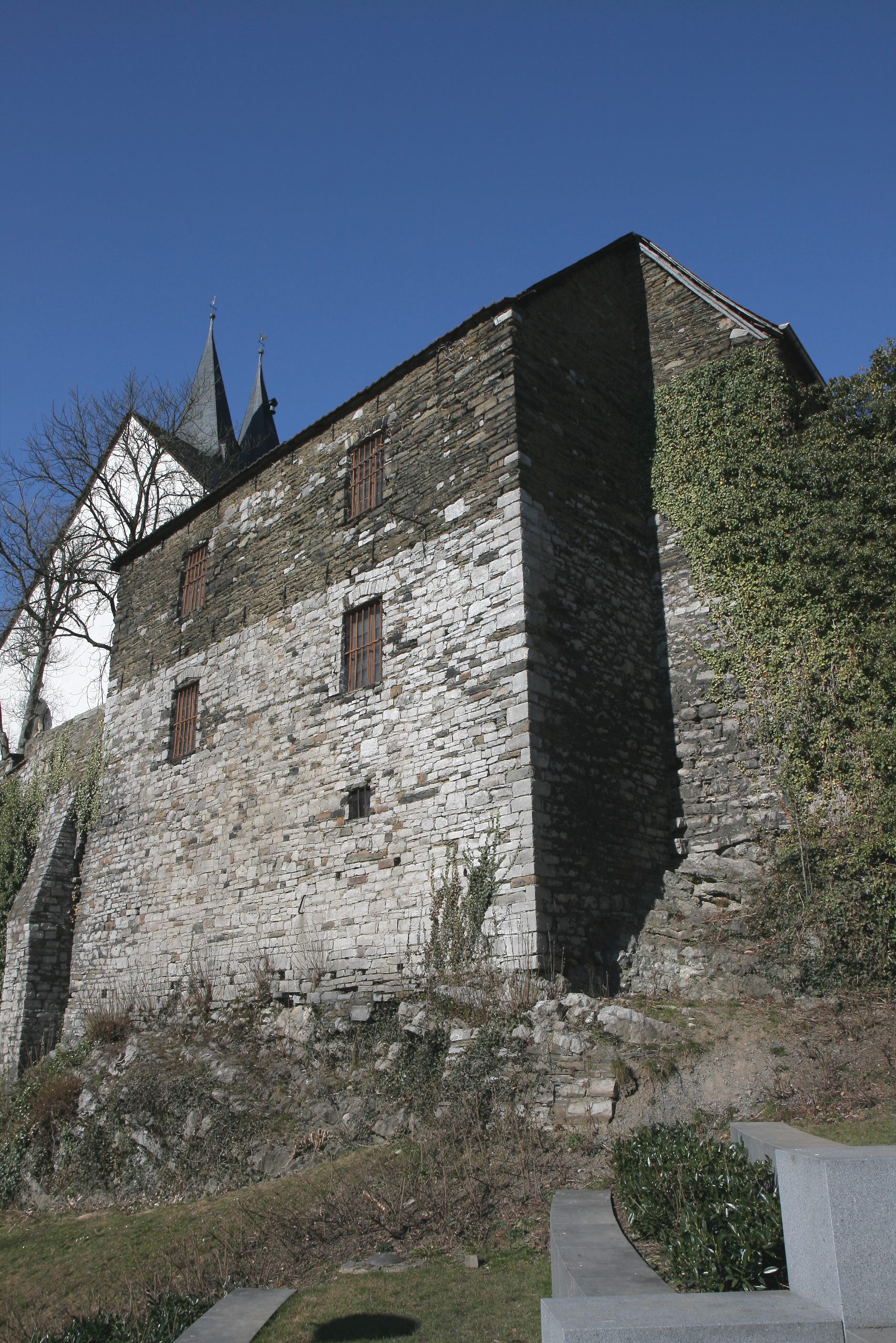 Ehemaliger Burgmannshof (Rückseite) in Iserlohn, Am Bilstein 16. Denkmalschutz seit 20. Juni 1983.